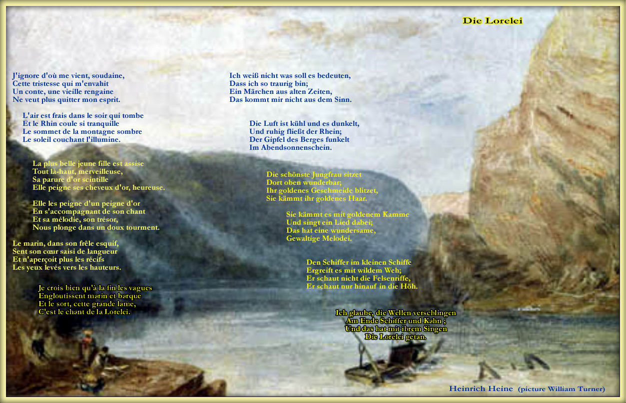 Turner - Heine (trad. M. Greslou)